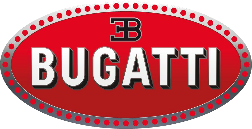 中文（台灣）: 布加迪汽车股份有限公司 logo